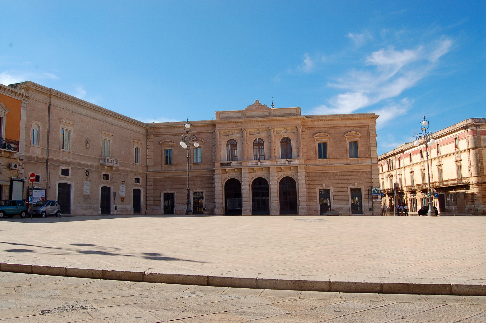 Fasano